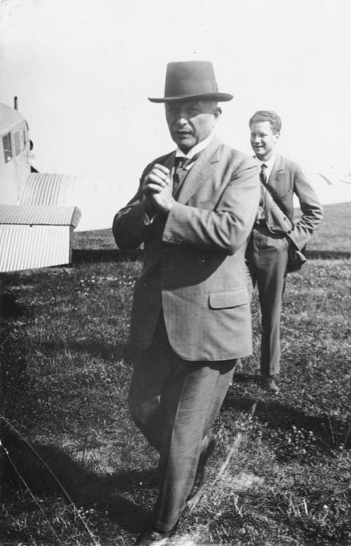 Prof. Junkers